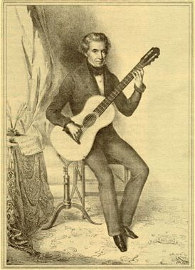 Dionisio_Aguado guitarrist (1784 - 1849)